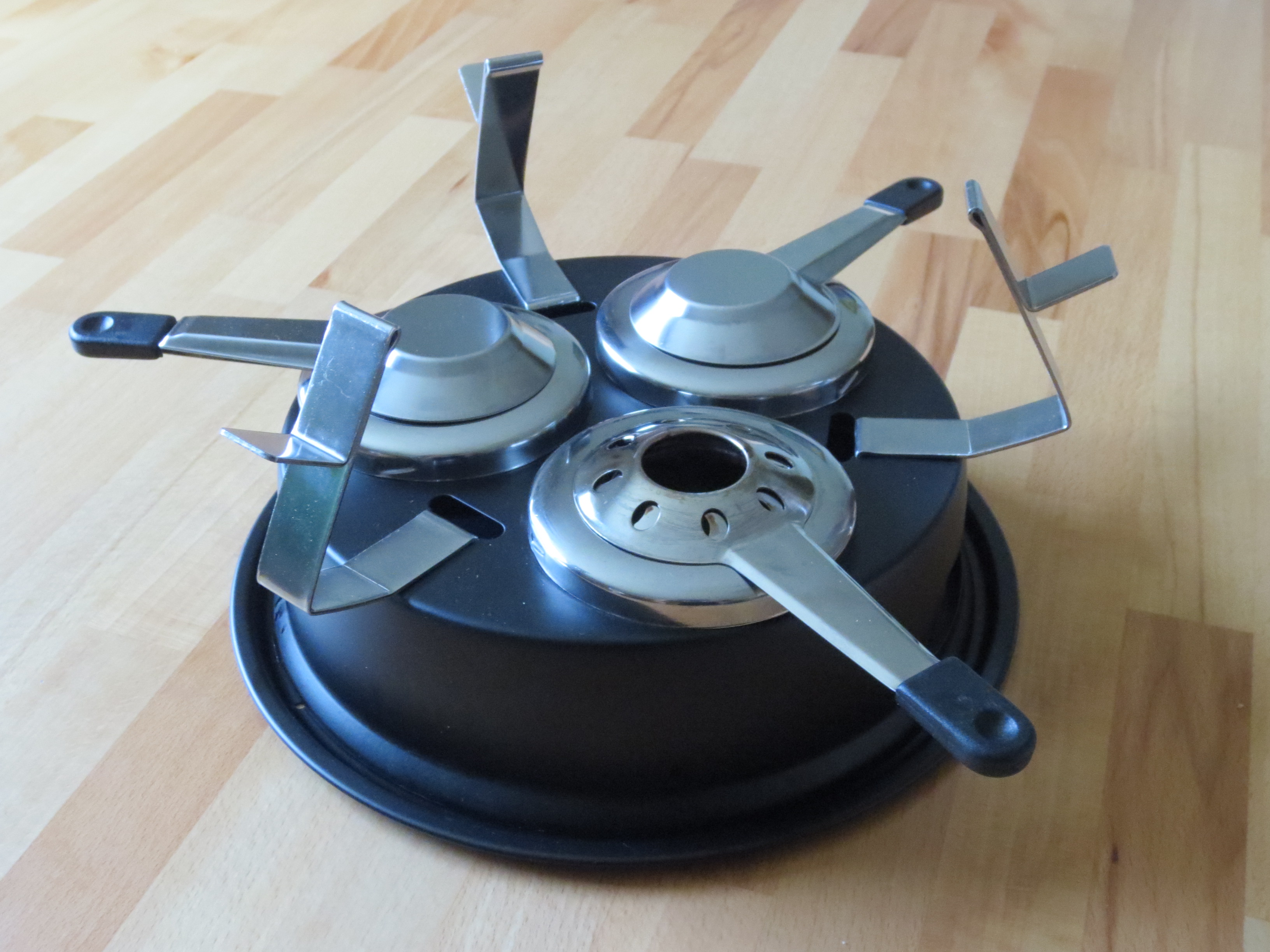 Pastenbrenner eines Tatarenhutes.